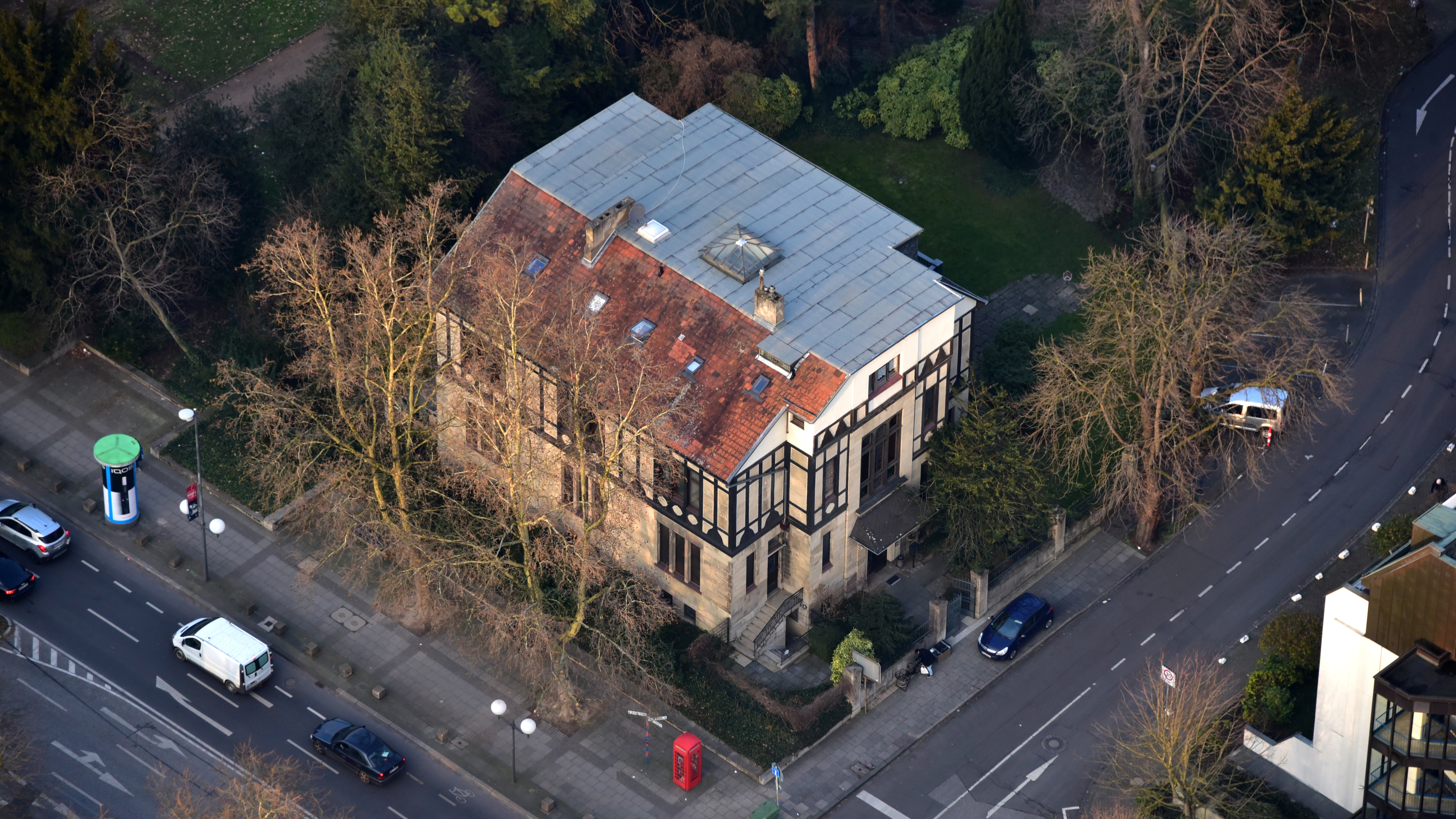 Denkmalgeschützte Villa, Adenauerallee 7, Bonn-Südstadt: Luftaufnahme (2018)